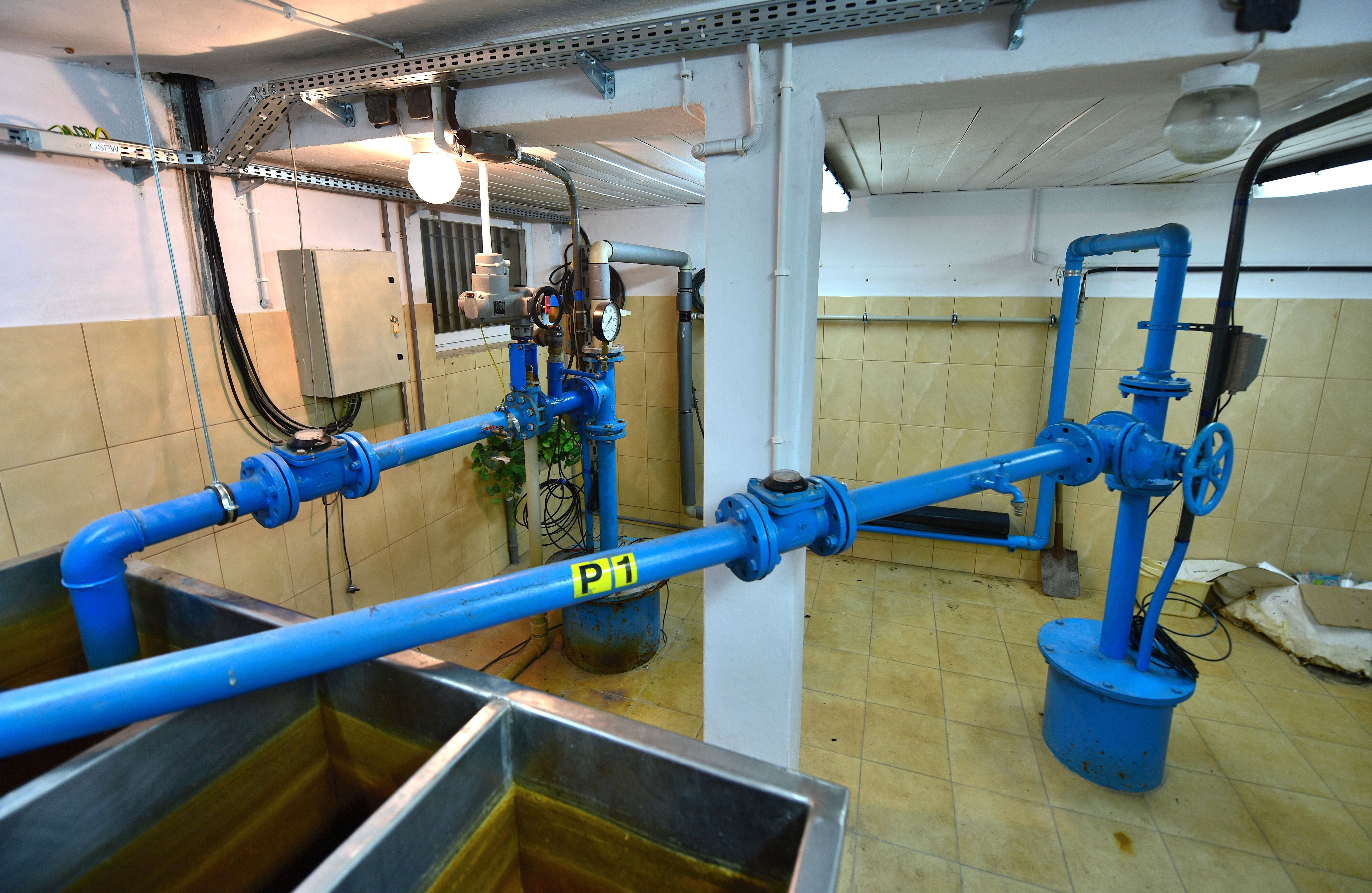 Stacja Badawcza Ochrony Środowiska i Wpływów Antropogenicznych na Wody Podziemne na Wydziale Geologii UW przy ul. Żwirki i Wigury 93. Studnie głębinowe ujmujące wodę z poziomu oligoceńskiego i czwartorzędowego